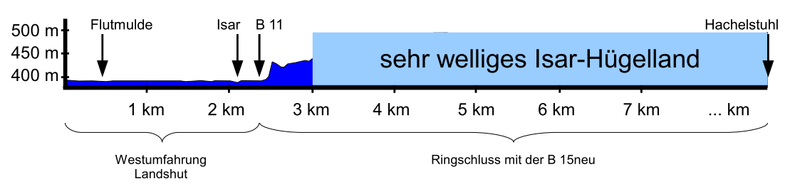 Die hierzu verwendeten Informationen und Daten zum Höhenverlauf basieren auf den Angaben der Amtlichen Topographischen Karte Bayern des Landesamtes für Vermessung und Geoinformationen. Die Lage der Westtangente Landshut bis zur B 11 wurde diversen Presseveröffentlichungen entnommen. Da der Verlauf einer Weiterführung der Westtangente Landshut als Ringschluss zur B 15neu (Ost-Süd-Umfahrung Landshut) bis Hachelstuhl bisher nicht bekannt ist, wurde dieser Bereich als Box dargestellt.